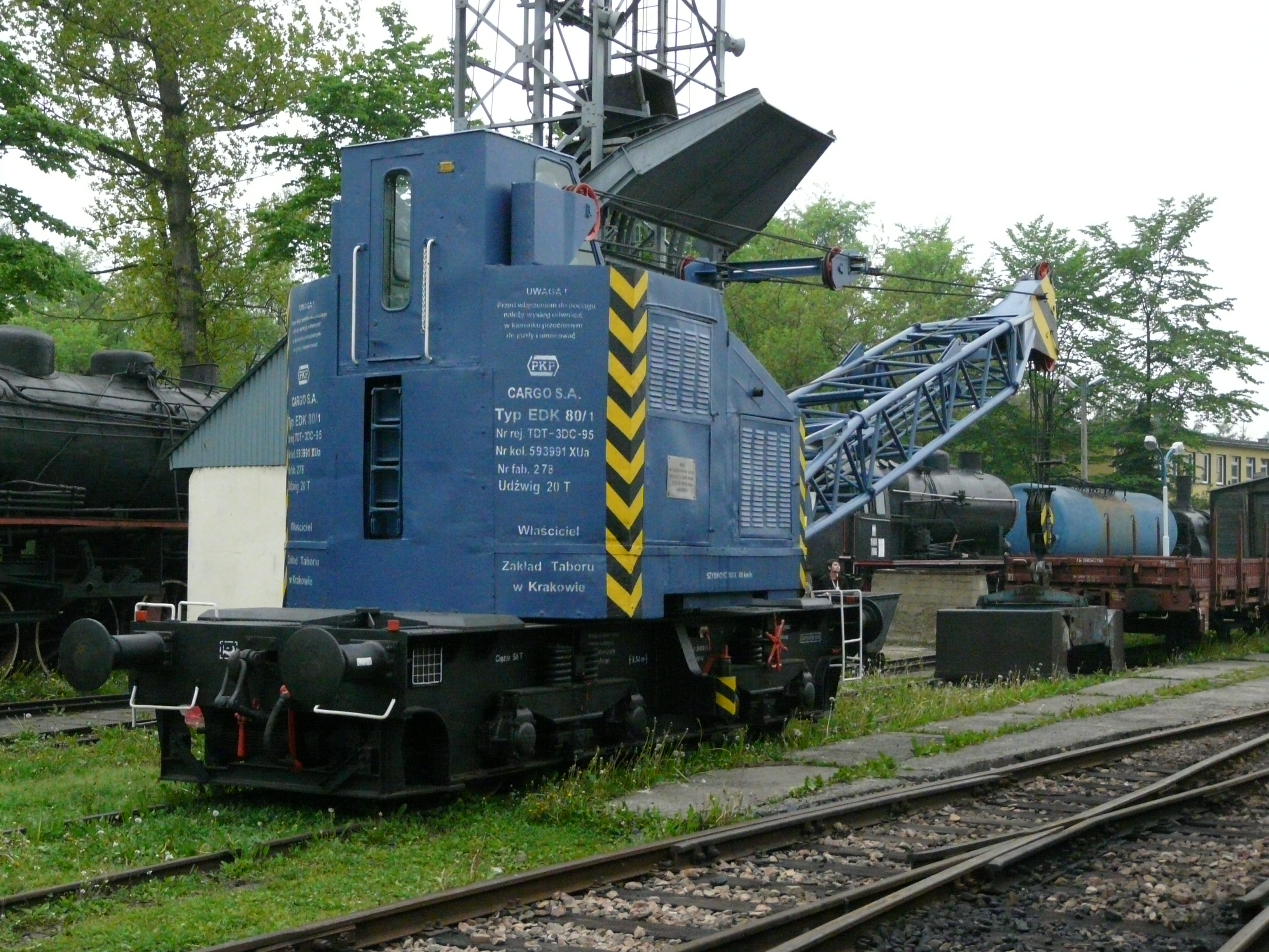 Skansen taboru kolejowego w Chabówce / Chabówka Rolling-Stock Heritage Park